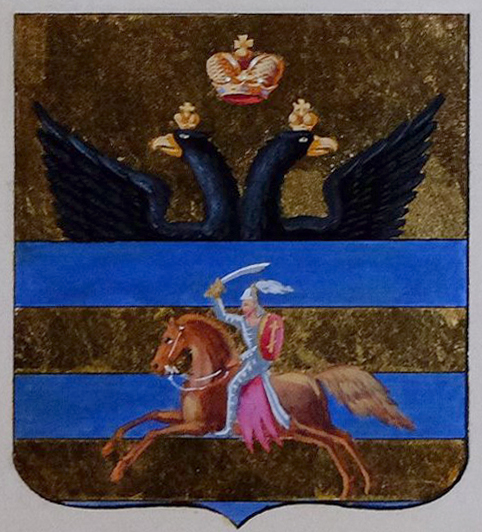 Беларуская (тарашкевіца): Гарадок (Haradok). Герб места з «Пагоняй» («Pahonia»)